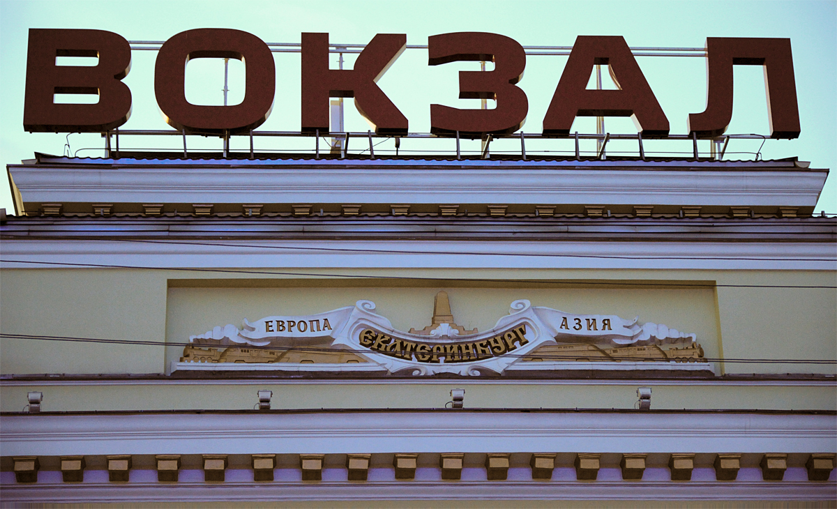 Punto di confine tra Europa e Asia sulla linea ferroviaria transiberiana a Ekaterinburg - RU Екатеринбург